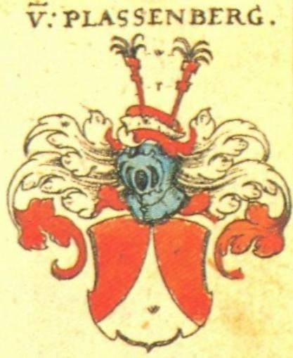 Wappen der Plassenberger nach Siebmachers Wappenbuch